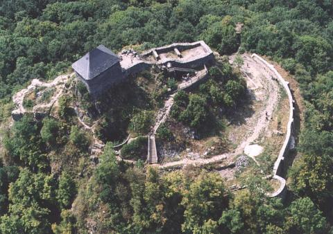 Salgó vára. A településrész egyik látnivalója. Salgó várának légifotója.